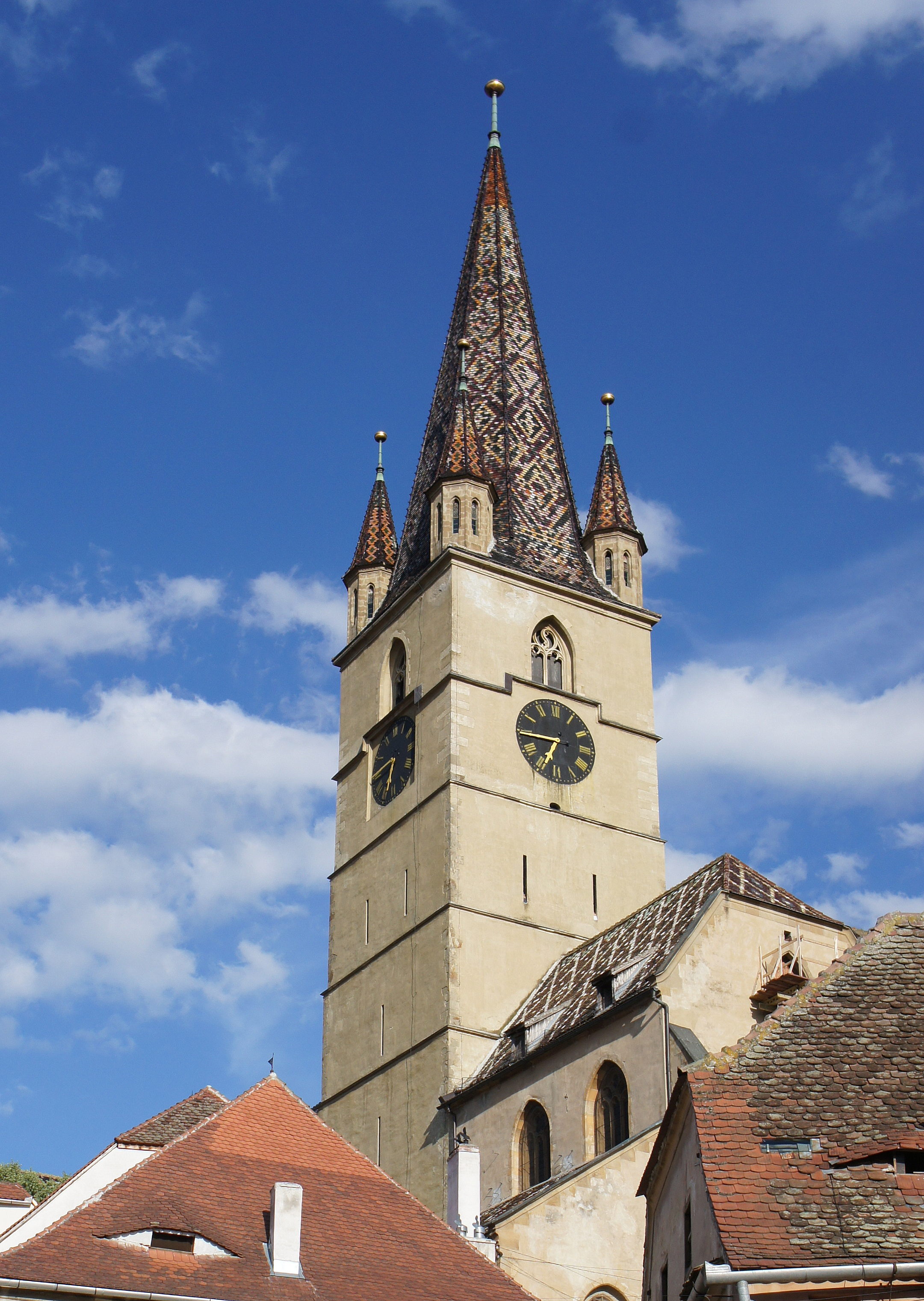 la cathédrale saxonne, emblème de Sibiu